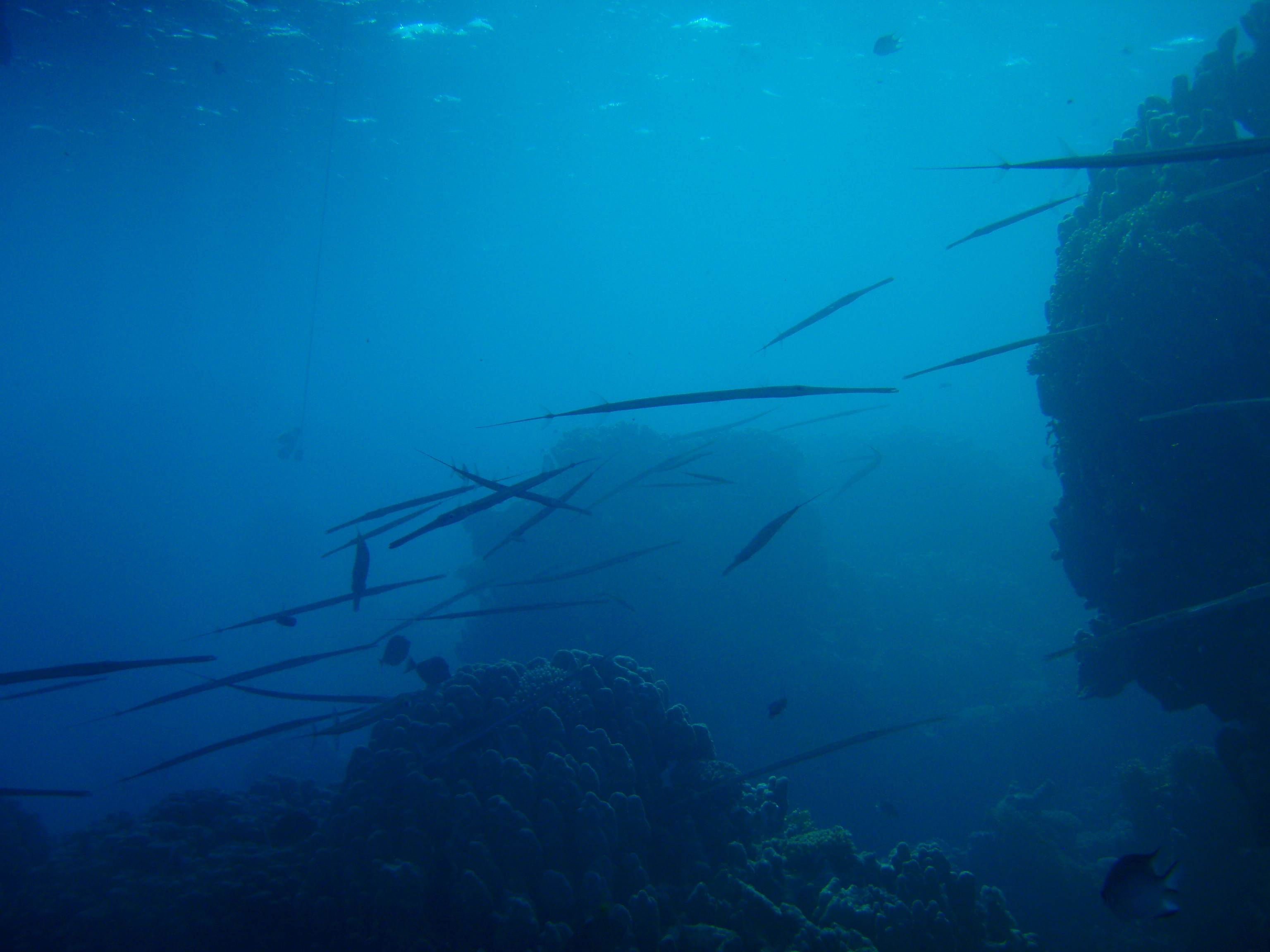 Glatter Flötenfisch (Fistularia commersonii)